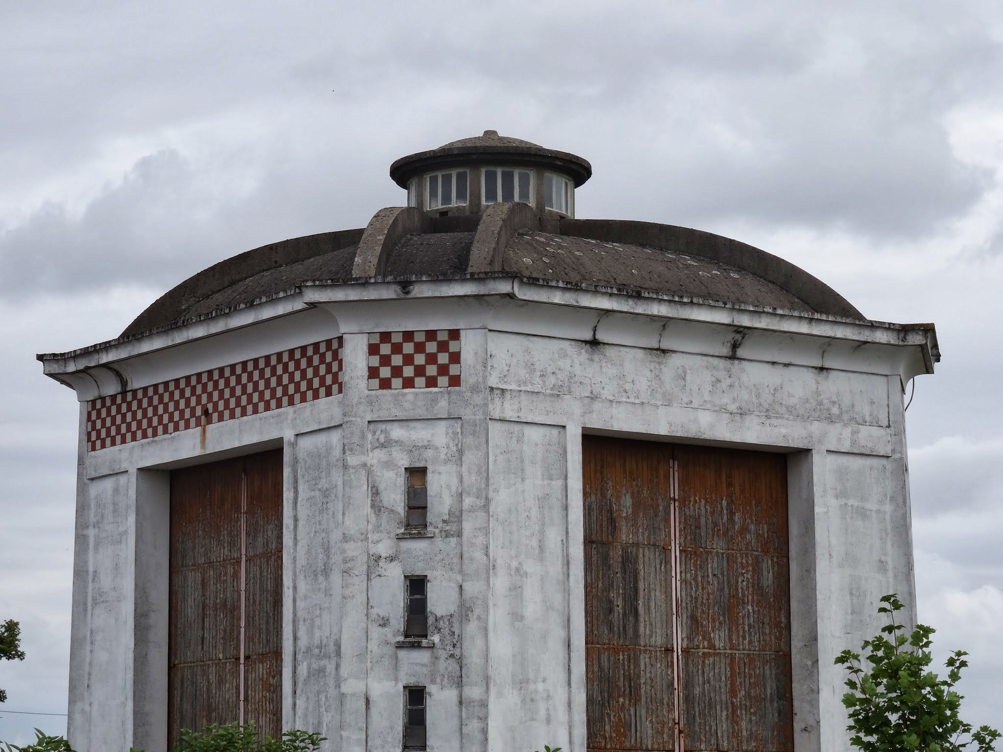 meteo station